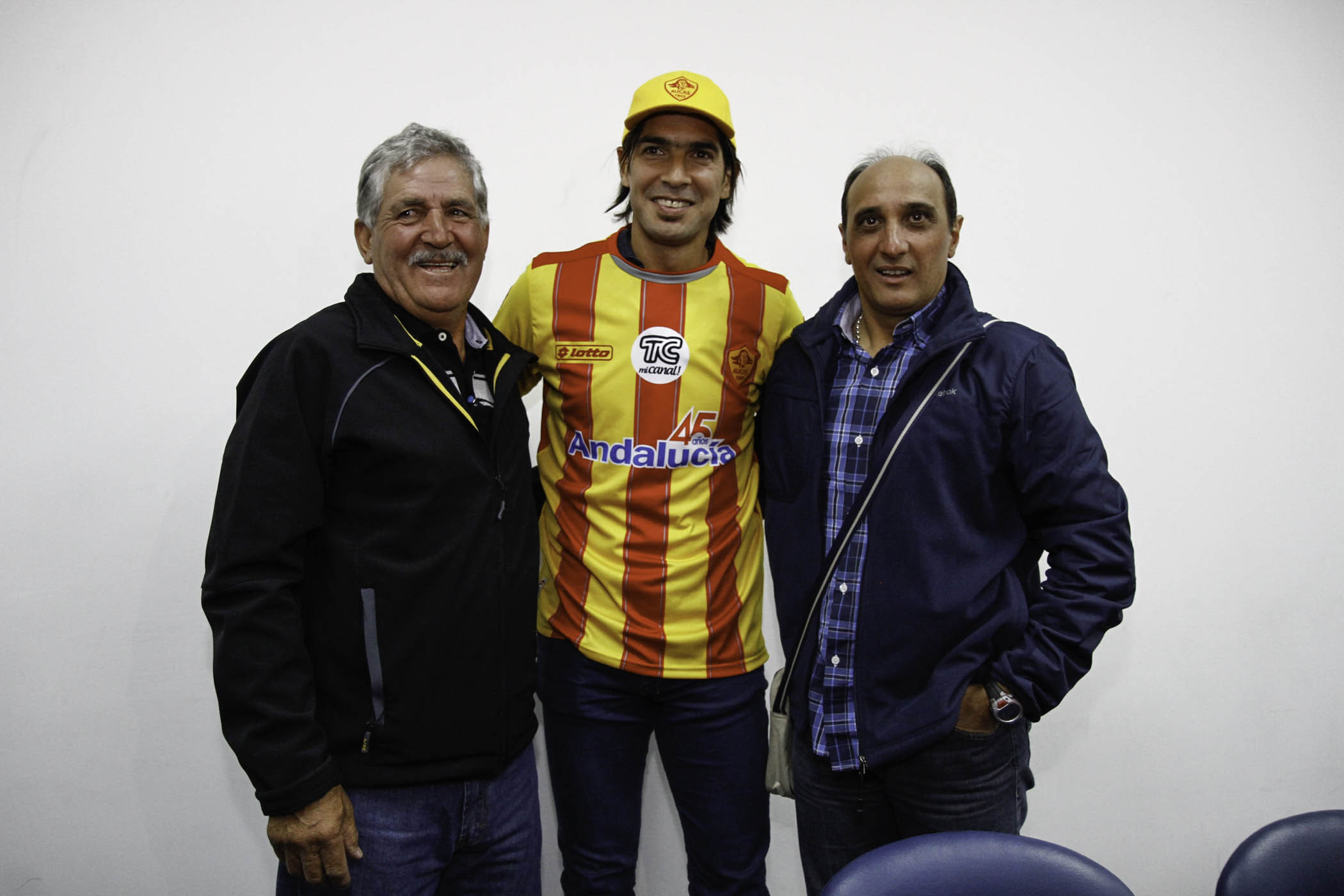 Quito, 17 mar (ANDES).- El delantero uruguayo Sebastián Abreu es la nueva contratación del Club Sociedad Deportiva Aucas. Foto: Micaela Ayala V./ANDES